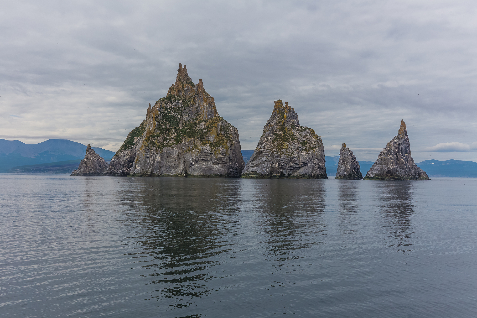 Магаданский заповедник: Ольский район, Магаданская область This image is related to the protected area of Russia number 4900024